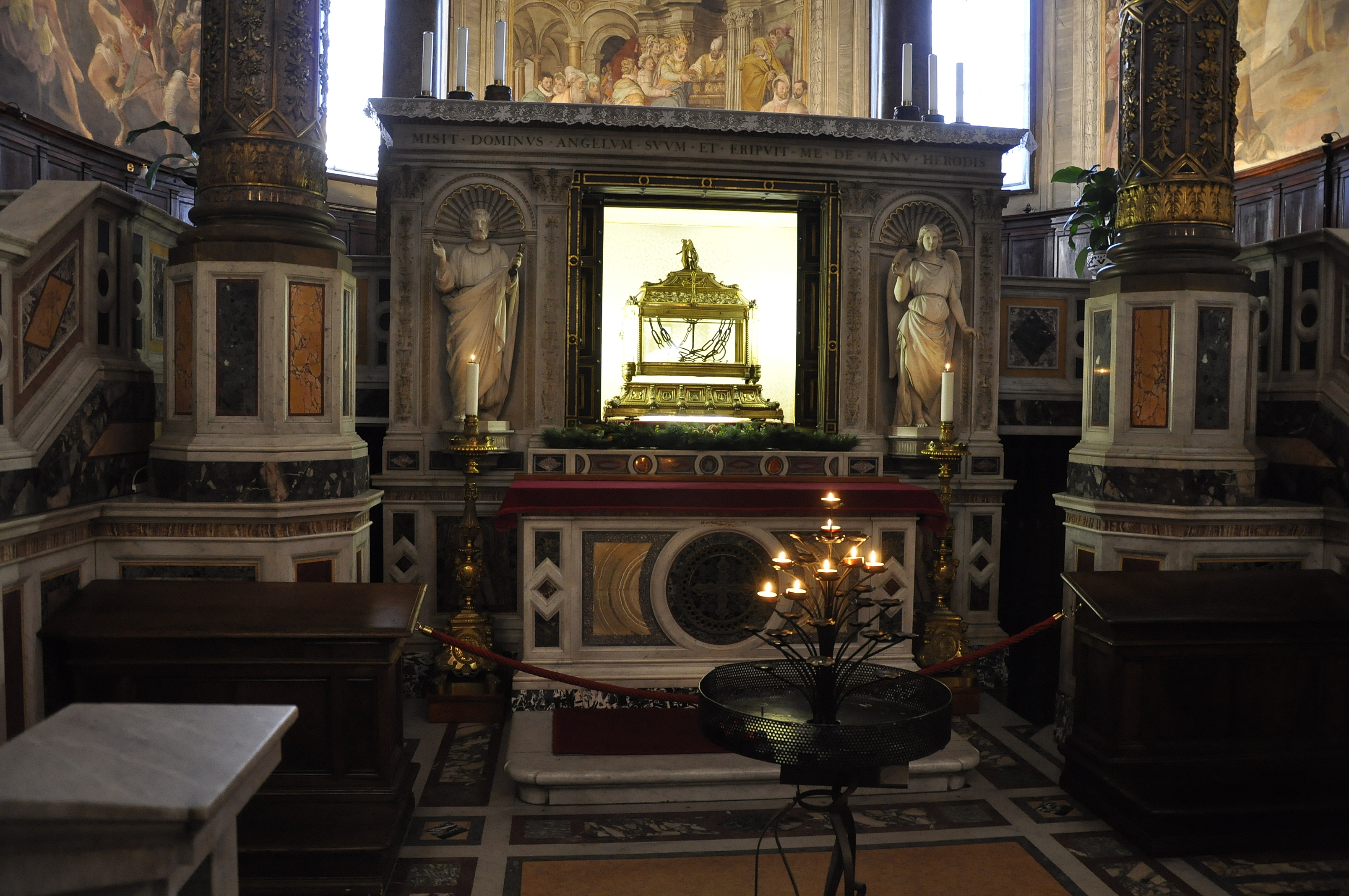 Sint-Petrus' Banden - Rome San Pietro in Vincoli 12-1-2011